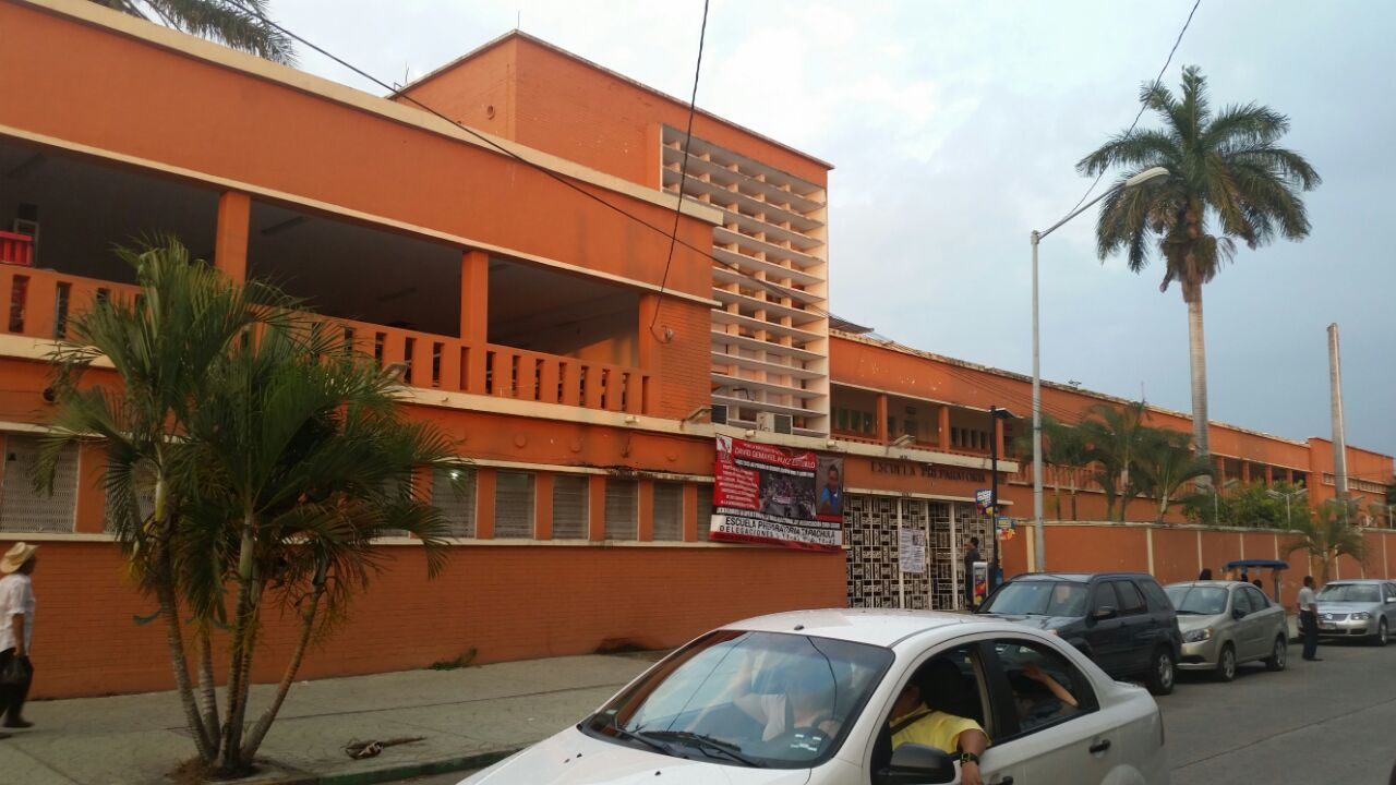 Edificio escolar Preparatoria Tapachula